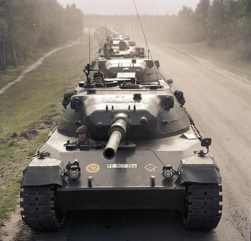 Reportage Bundeswehr Leopardpanzer, Munsterlager, KTrS III [Munsterlager, Truppenübungsplatz in der Lüneburger Heide]